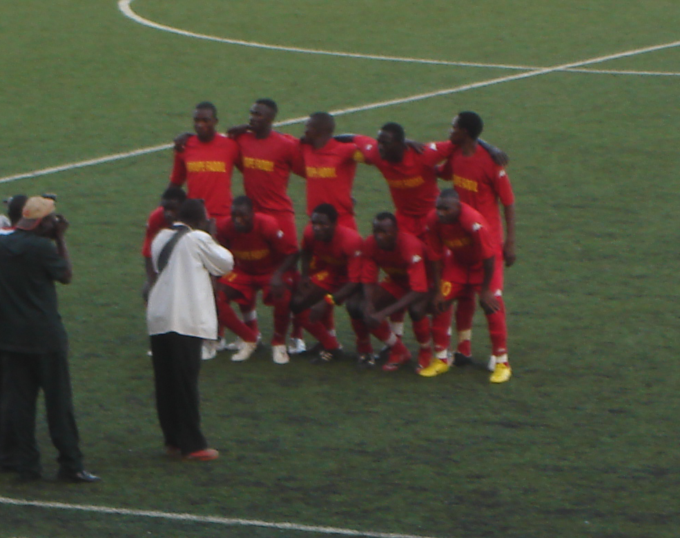 Burkina Faso: mannschaftsfoto von ASFA-Yennenga Ouagadougou